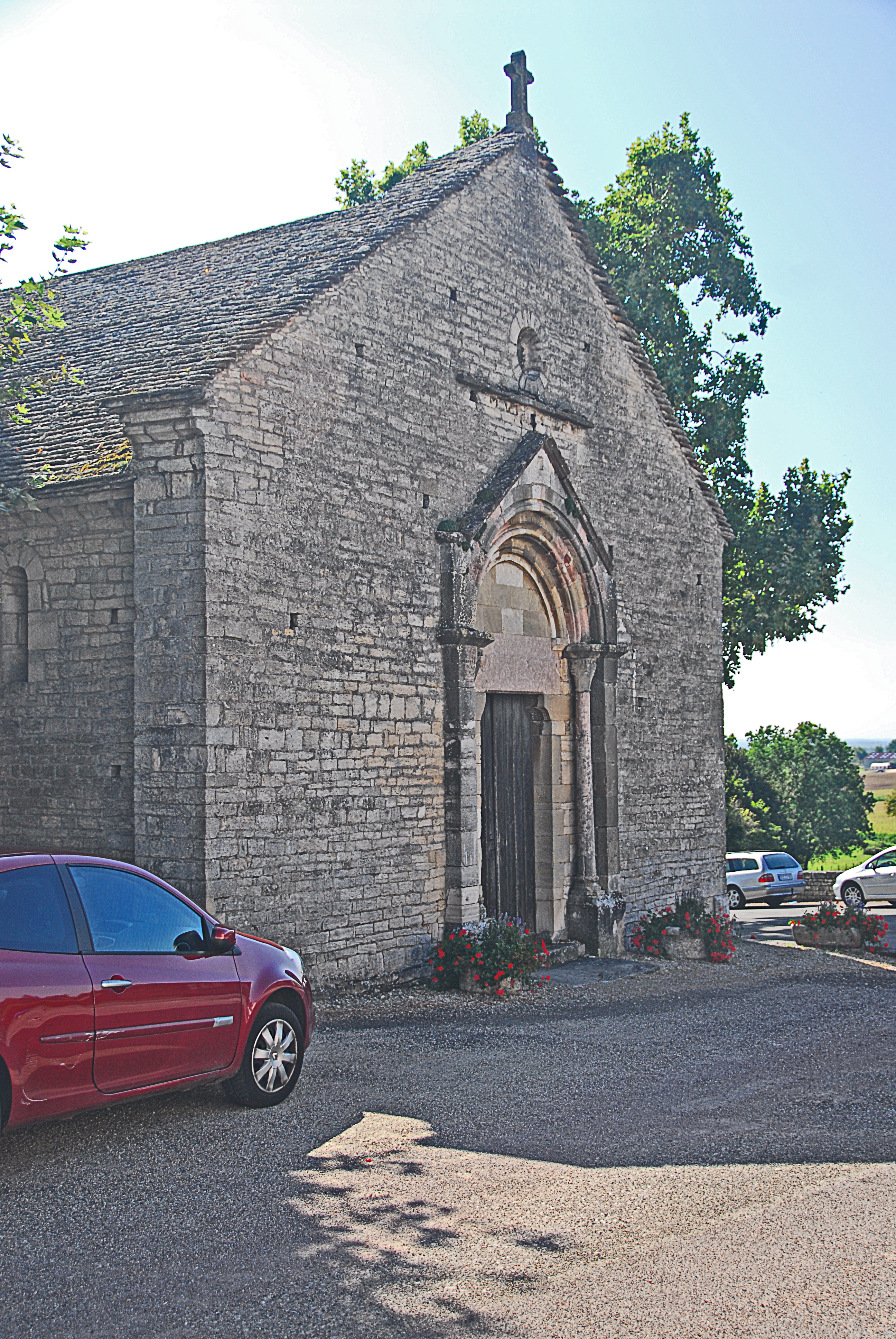 St-Basrthélémy,Farges, Fassade mit Hauptportal